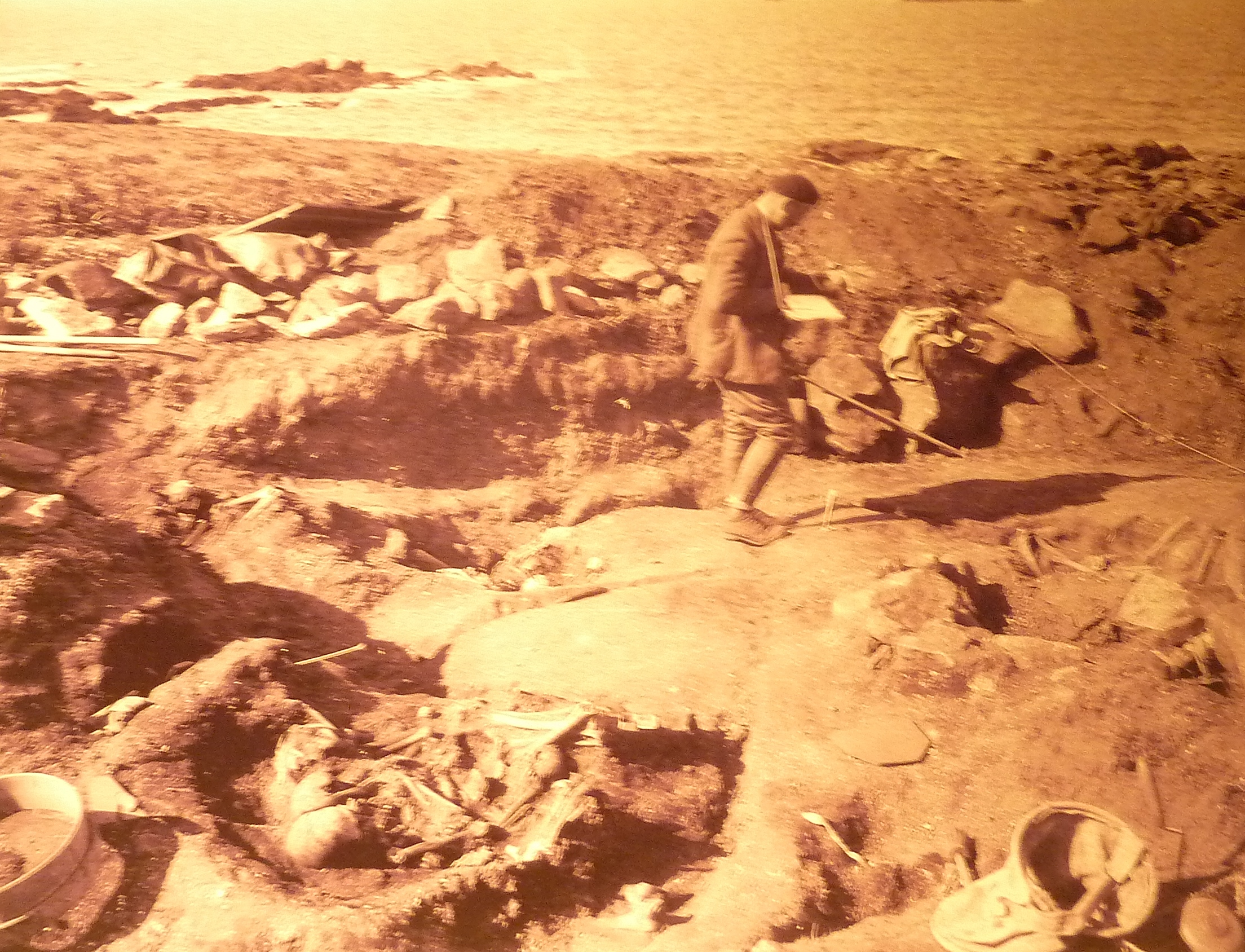 Vue générale de la nécropole de Téviec (photographie prise par Saint-Just-Péquart, musée de préhistoire de Carnac)